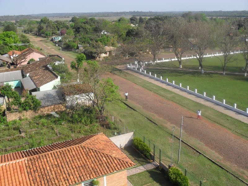 Imagen Tomada desde el Tanque de Agua